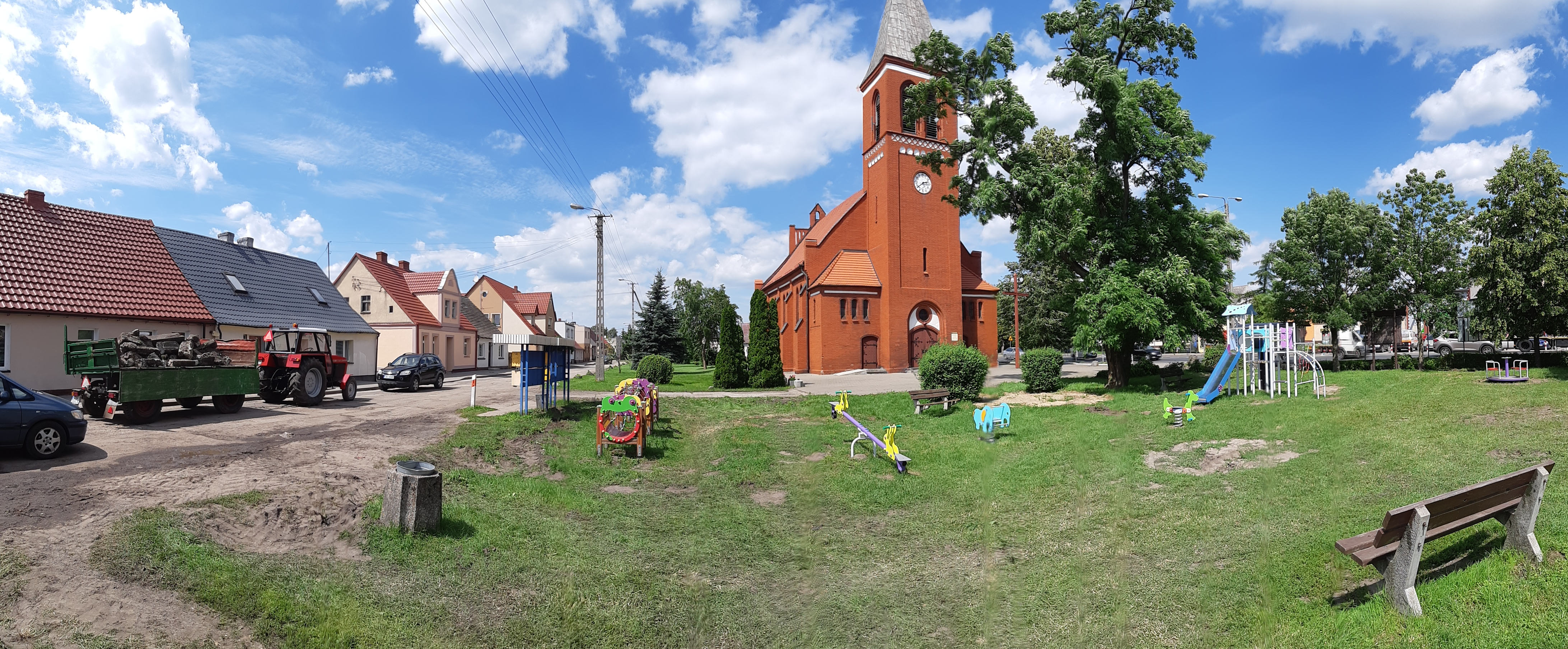 Panorama wsi